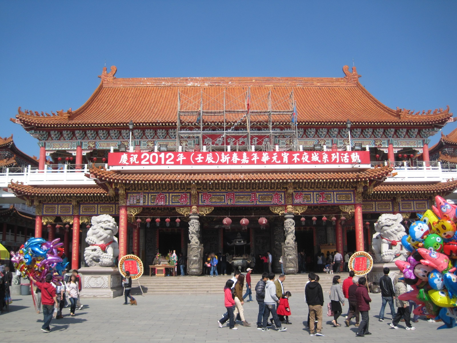 鹿耳門聖母廟，位於安南區土城